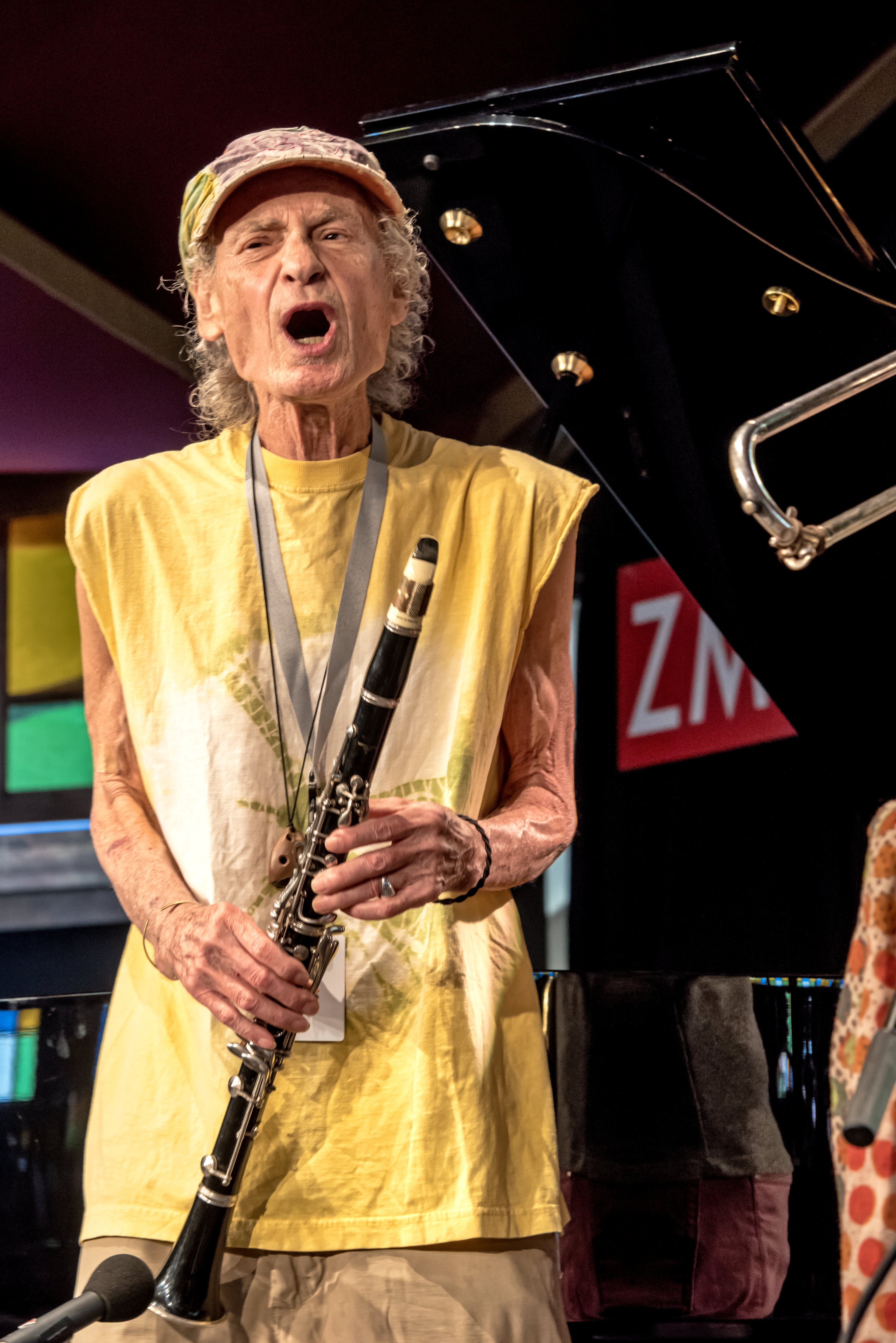 Bilder vom Zelt Musik Festival 2017 in Freiburg im Breisgau Die Klassikmatinee "Von Bach bis Gerschwin und Piazolla"